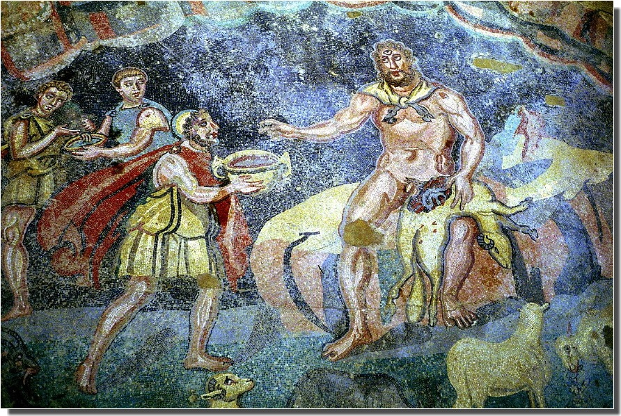 Mosaici Piazza Armerina